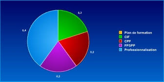 camenbert répartition